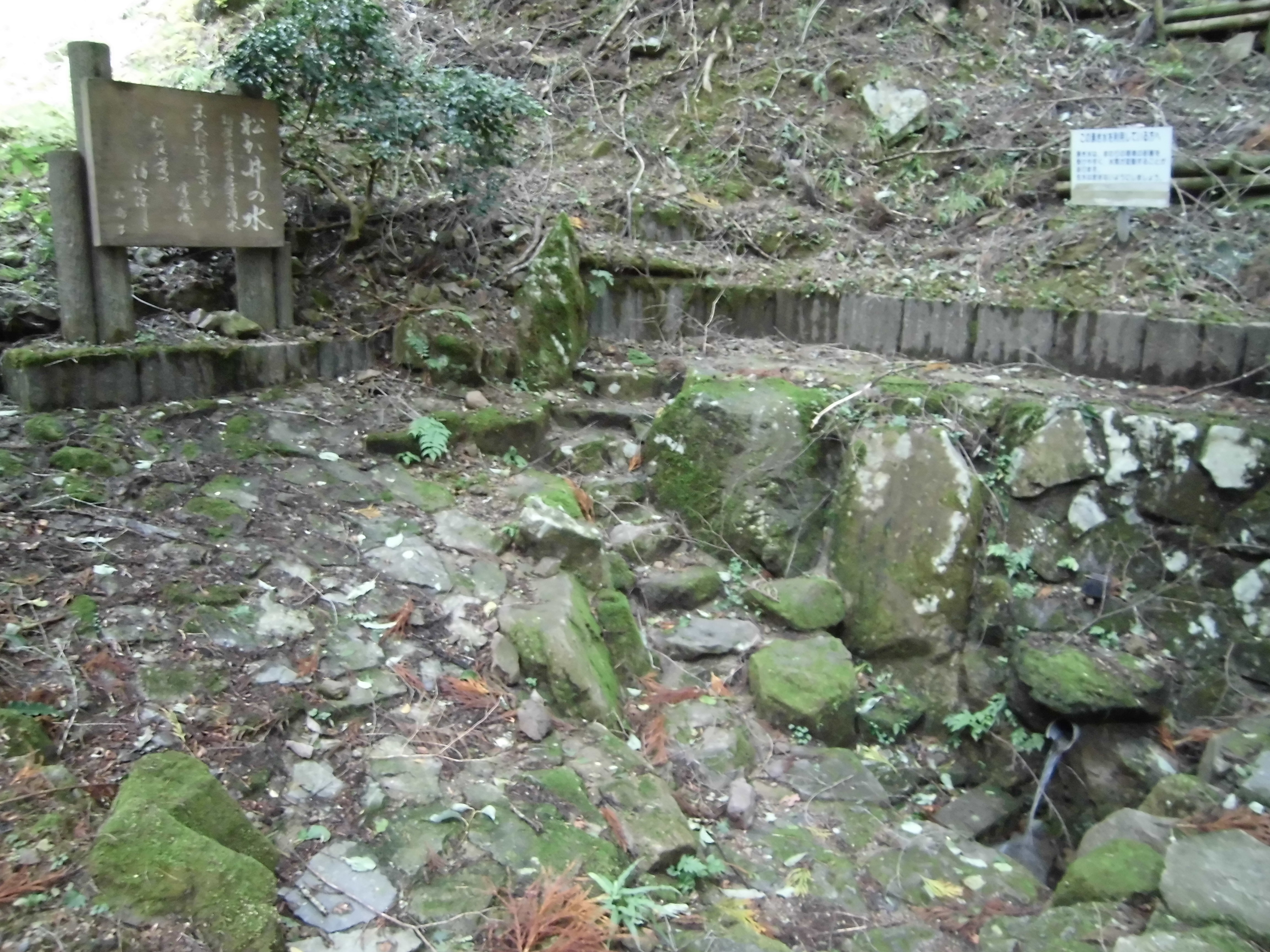 兵庫県多可郡多可町の湧水